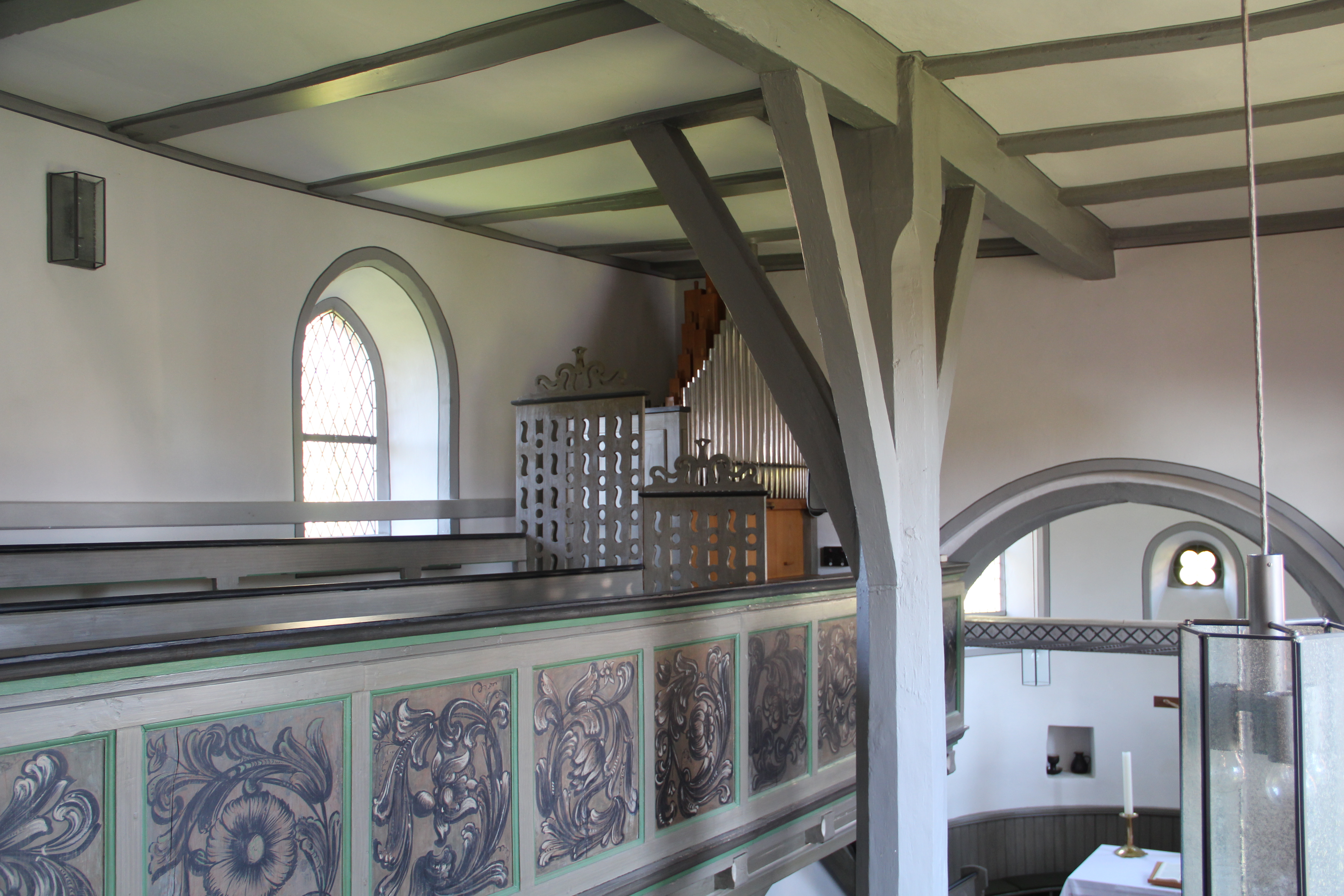 Oberwalgern